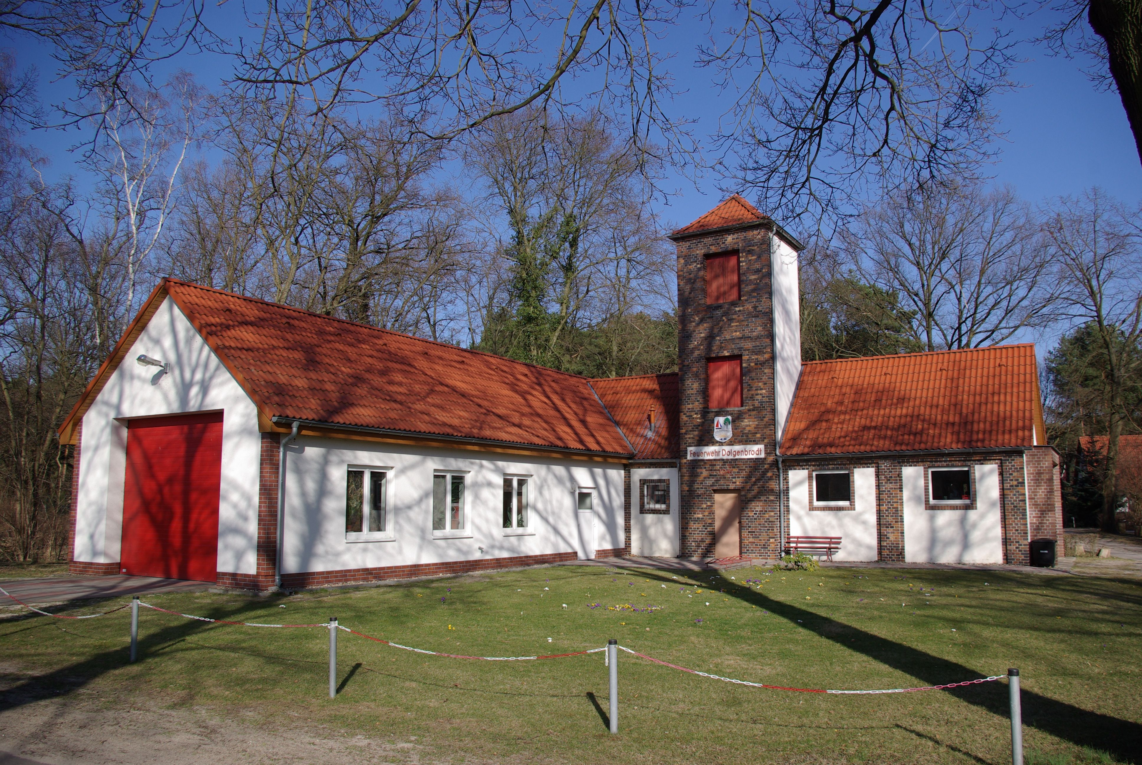 Heidesee Ortsteil Dolgenbrodt in Brandenburg. Das Bild zeigt die Freiwillige Feuerwehr.